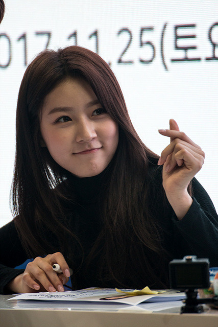 11월 25일 김새론 팬싸인회